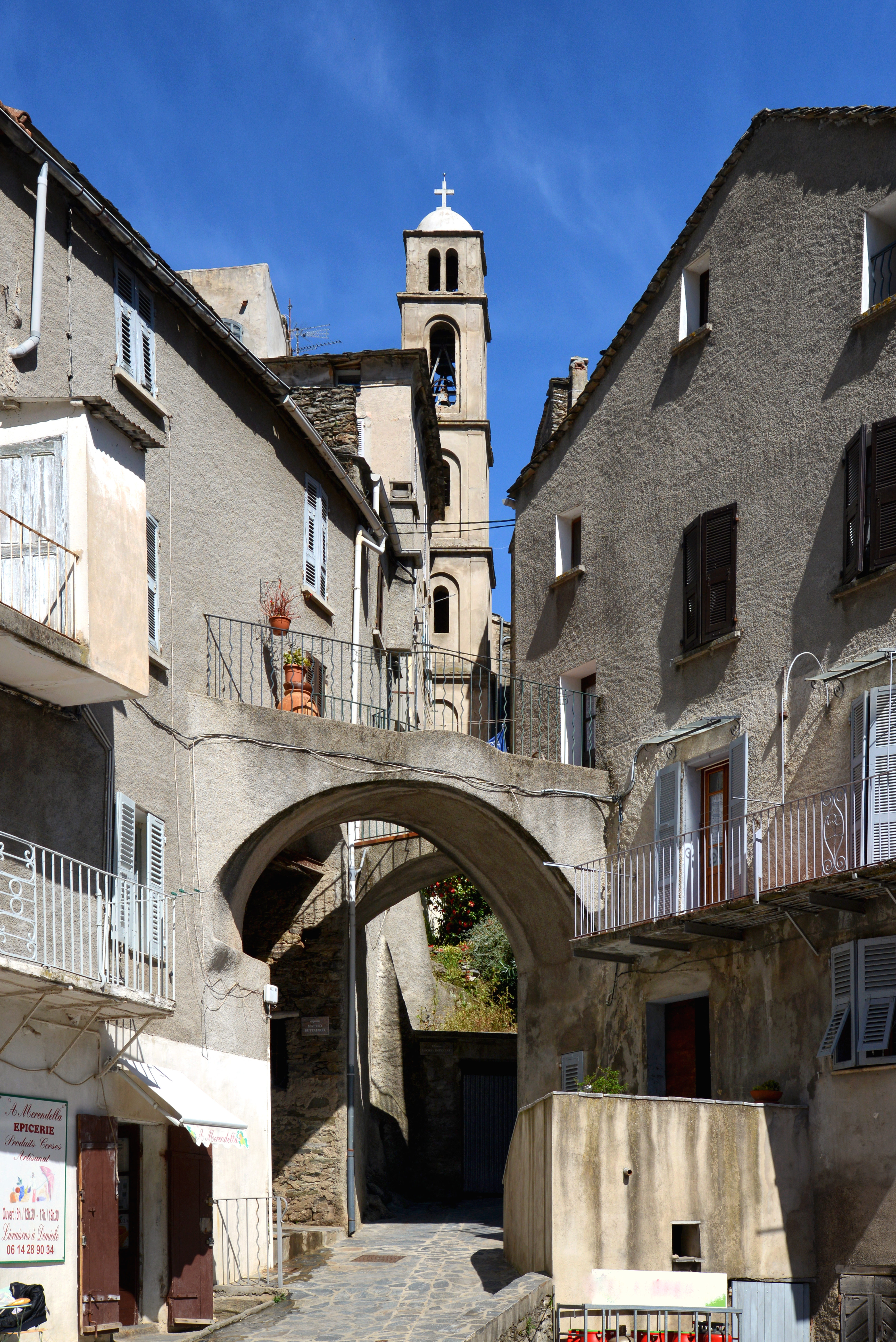 Vescovato, Casinca (Corse) - Quartier Santa Croce et clocher de l'église Saint-Martin